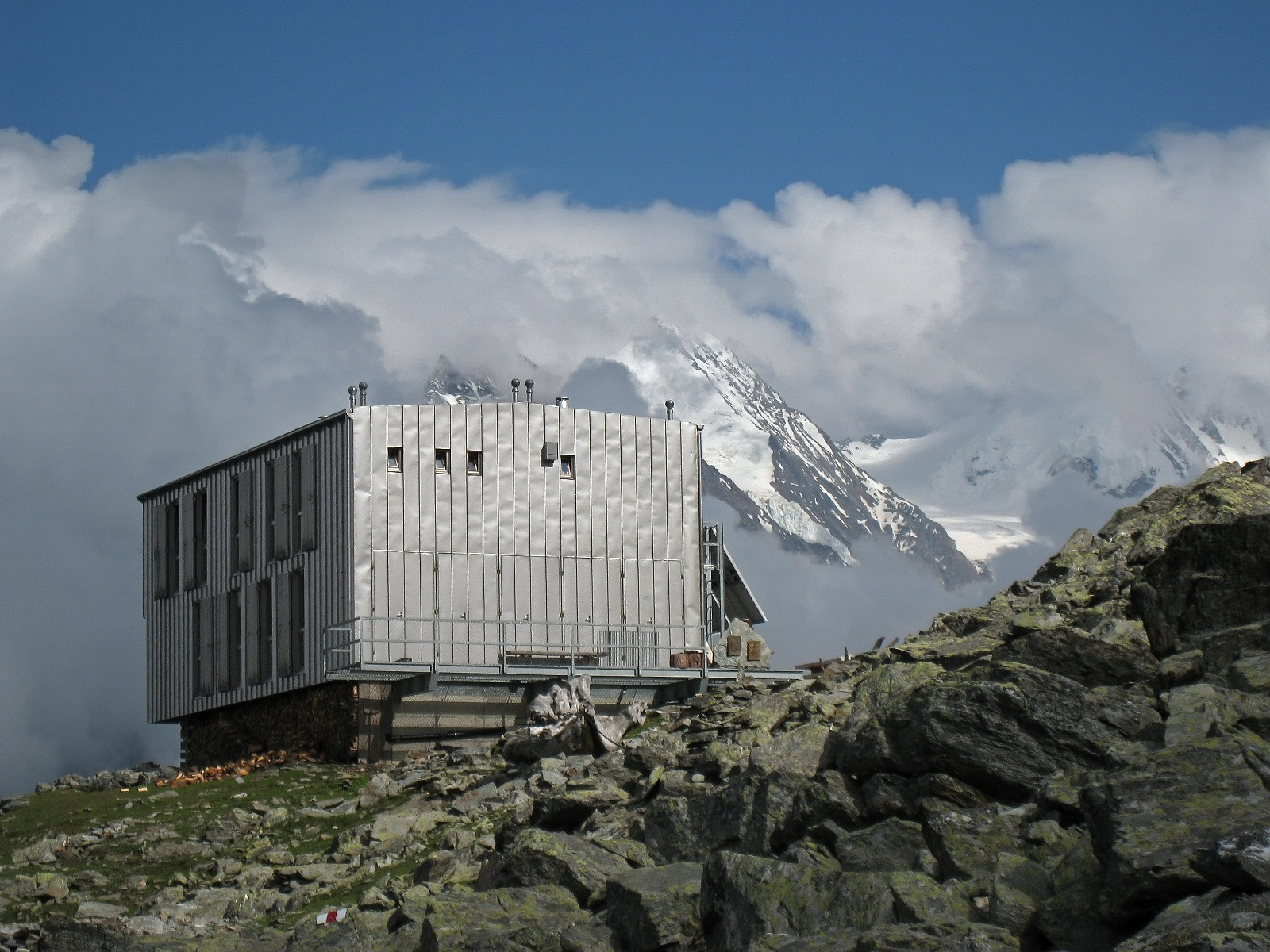 Topalihütte